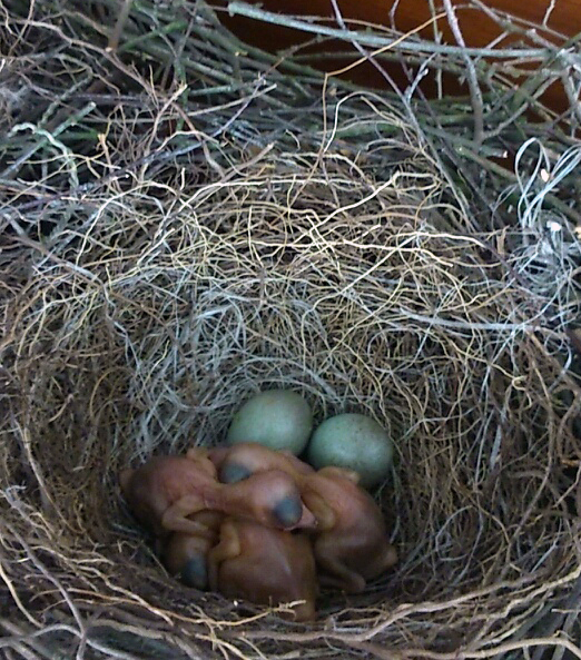 Pisklaki Sójki w gnieździe: tuż po wykluciu